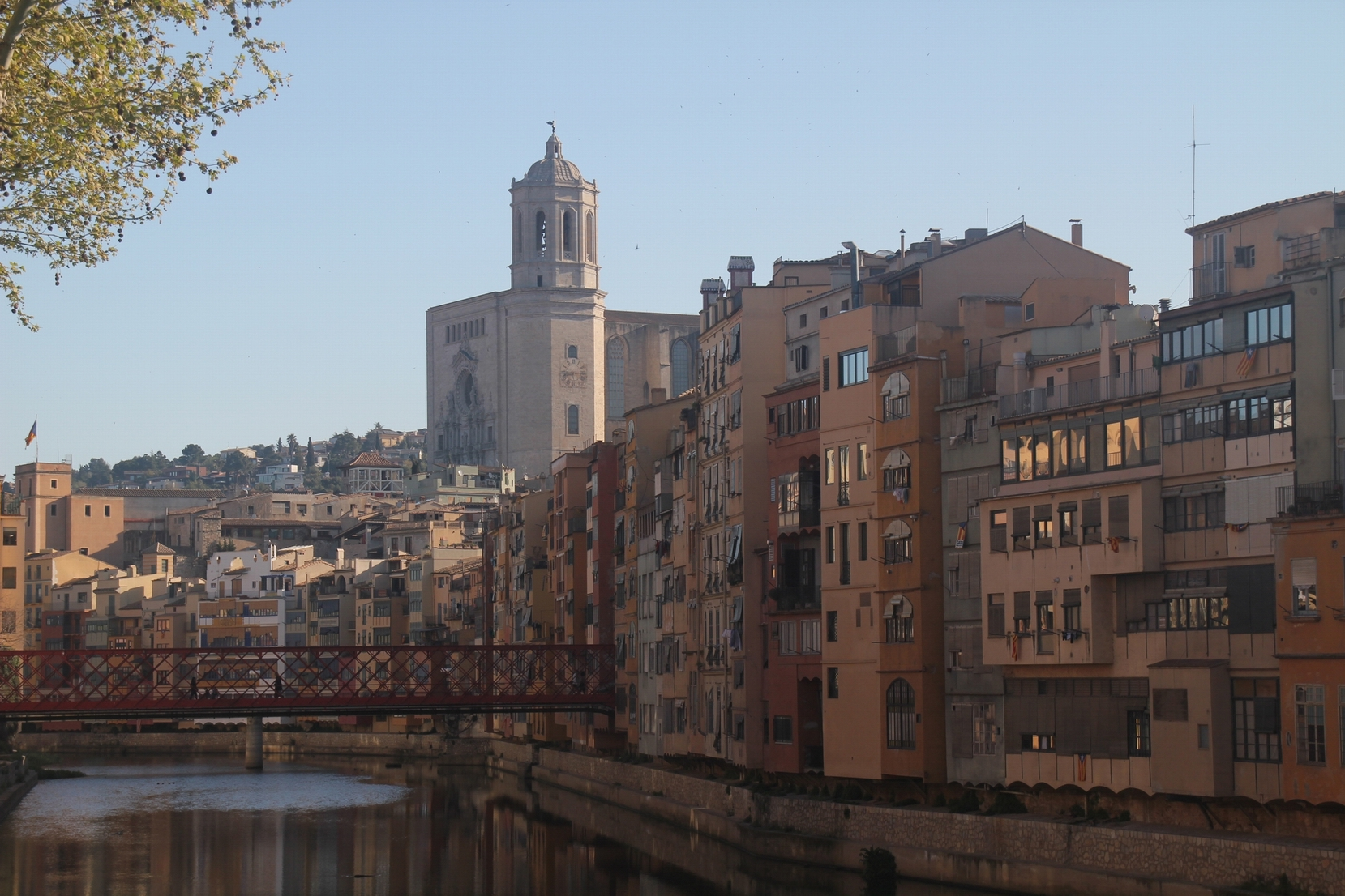 Casas de Onyar y la catedral